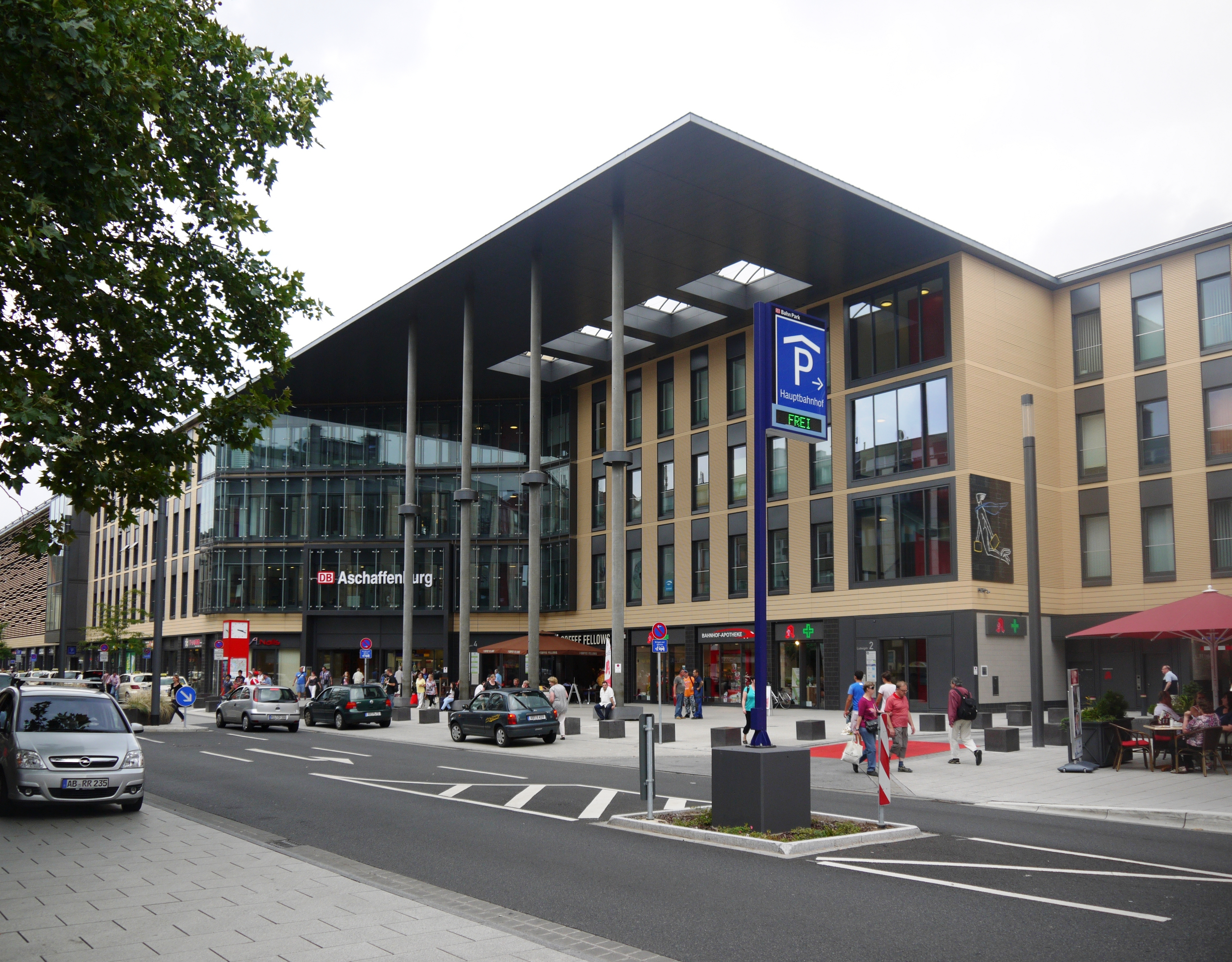 Aschaffenburg Hbf Ludwigstraße 2-4